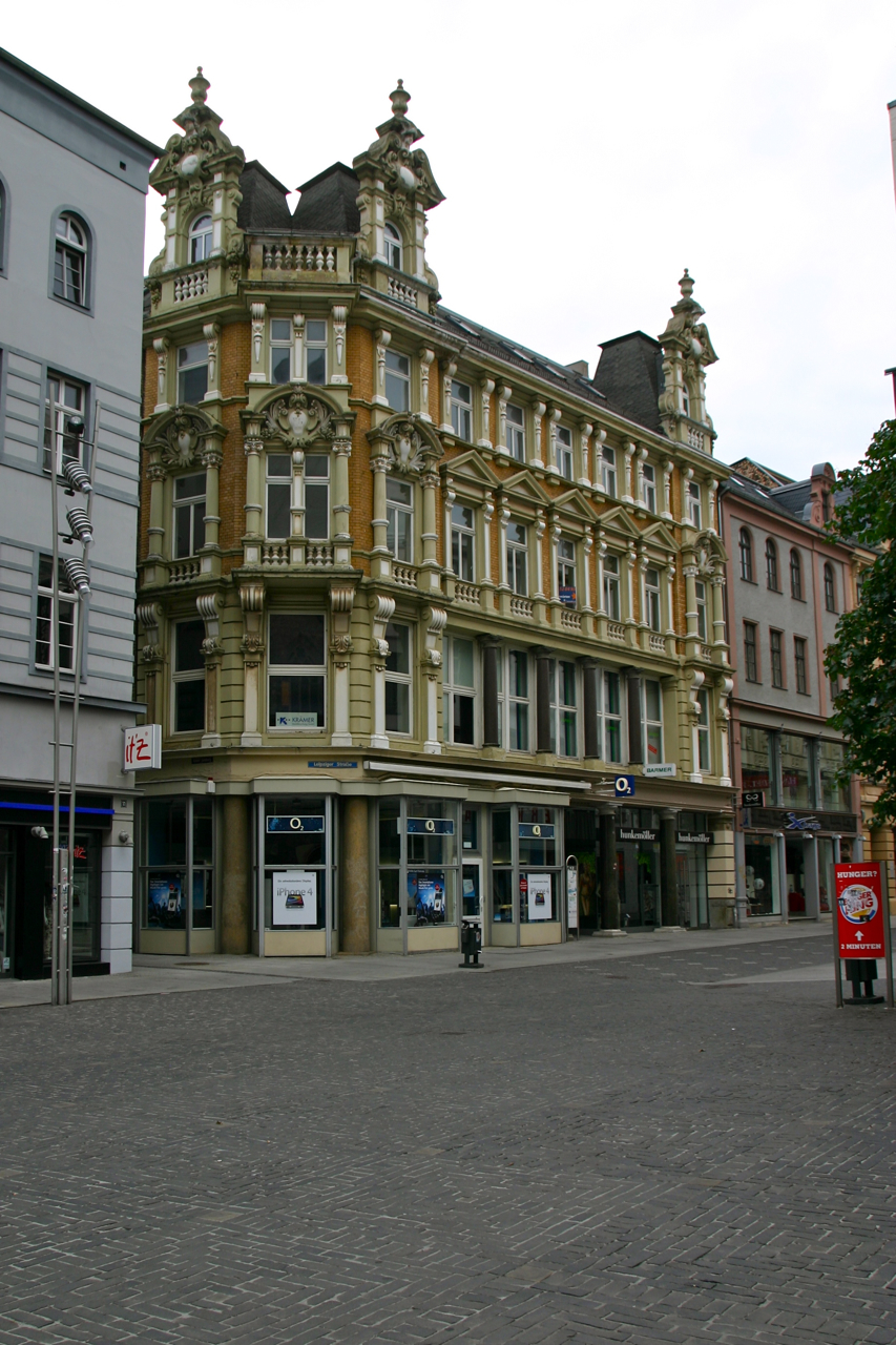 Die Leipziger Straße 12 in Halle (Saale).